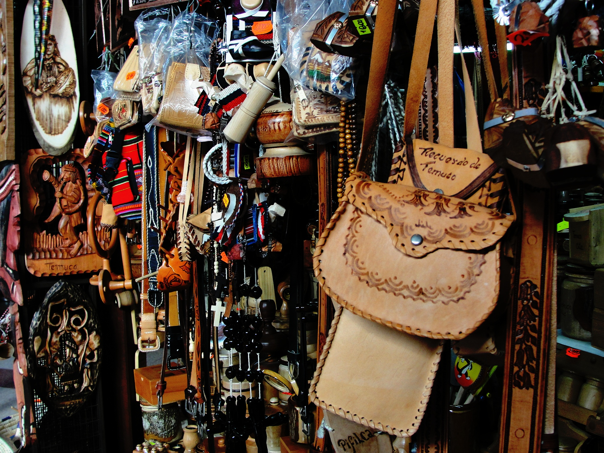 Artículos, souvenirs y artesanías por montones en los puestos del mercado. (Un guiño a aquella toma de la Feria de San Telmo, años atrás) Mercado Municipal, Temuco, IX Región de la Araucanía, Chile [?]